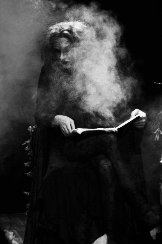 Freak o´clock